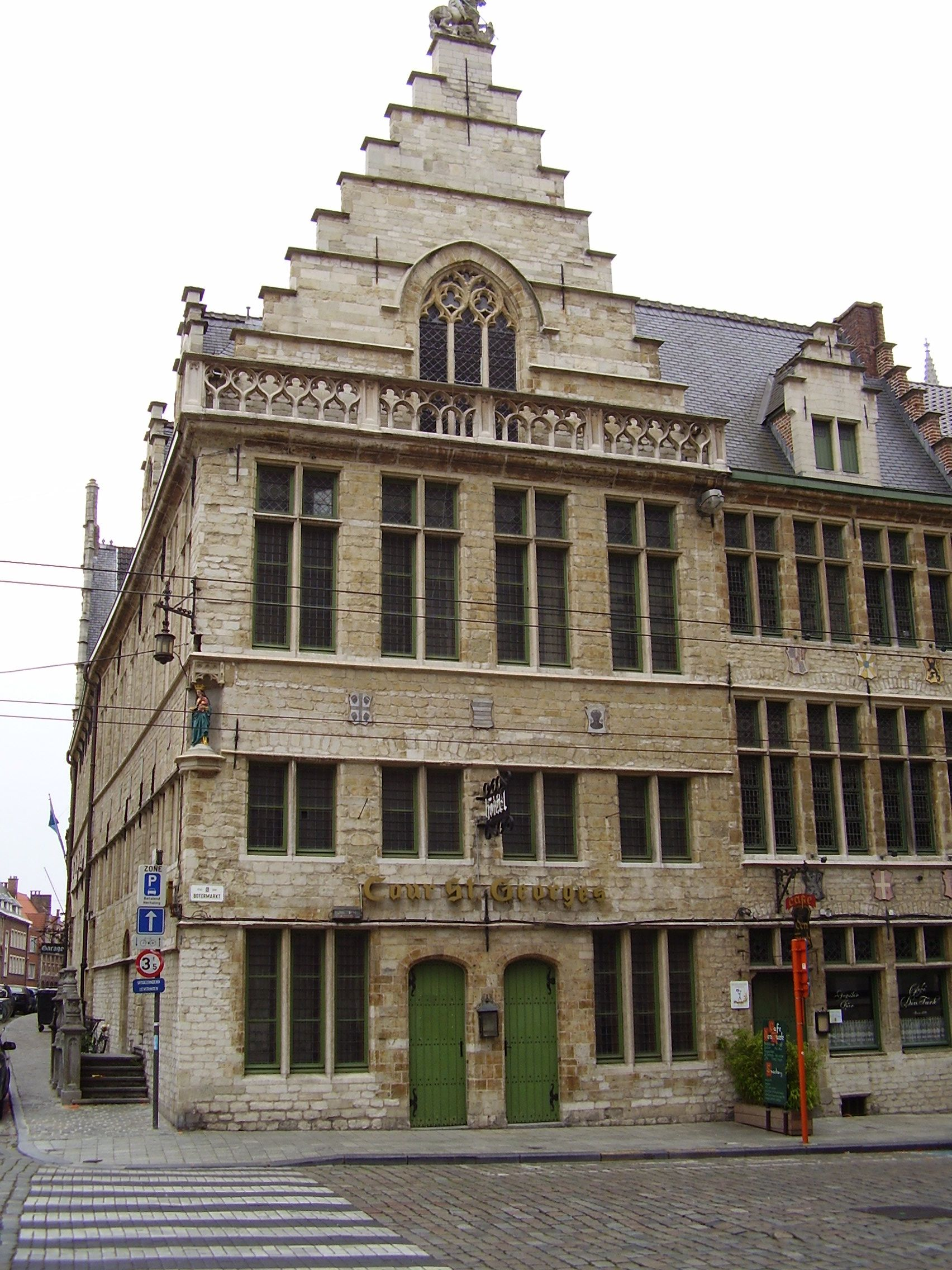 Hotel-restaurant 'Cour St-Georges' in Gent, volgens sommigen het oudste nog bestaande hotel in Europa.